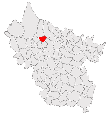 Categorie:Hărţi ale judeţului Buzău